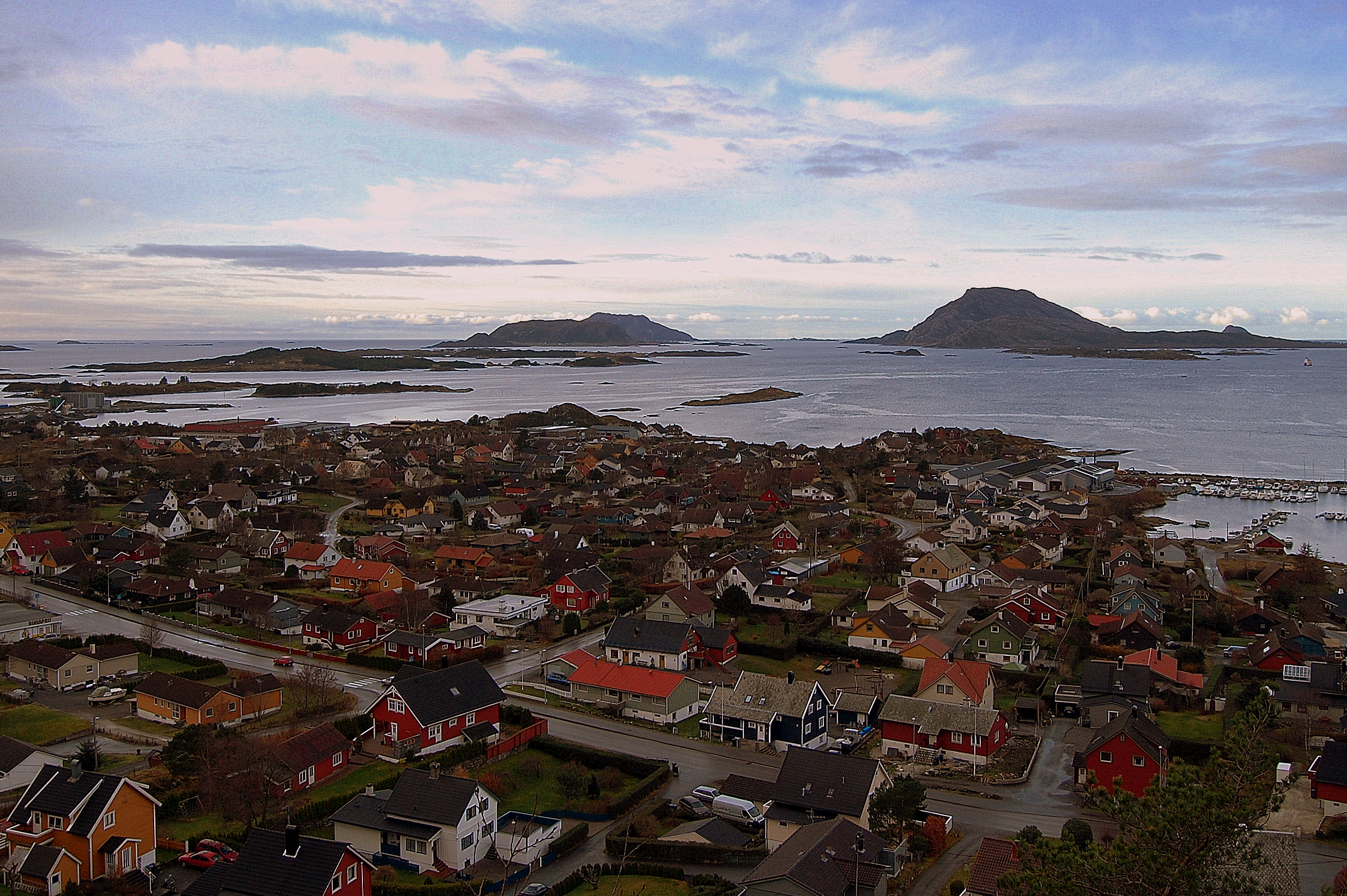 Florø